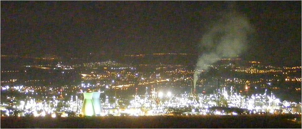 ארוע זיהום אוויר ממתחם בז"ן